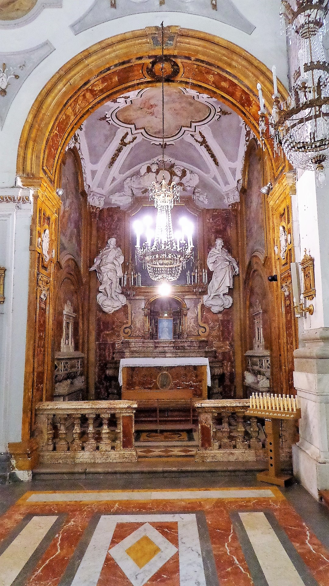 Cappella laterale sx. Cappella del Bambin Gesù già Cappella di Santa Maria Nunziata o Cappella del Bambinello della Gancia. Le statue di David e Isaia sono opere di Gaspare Firriolo.